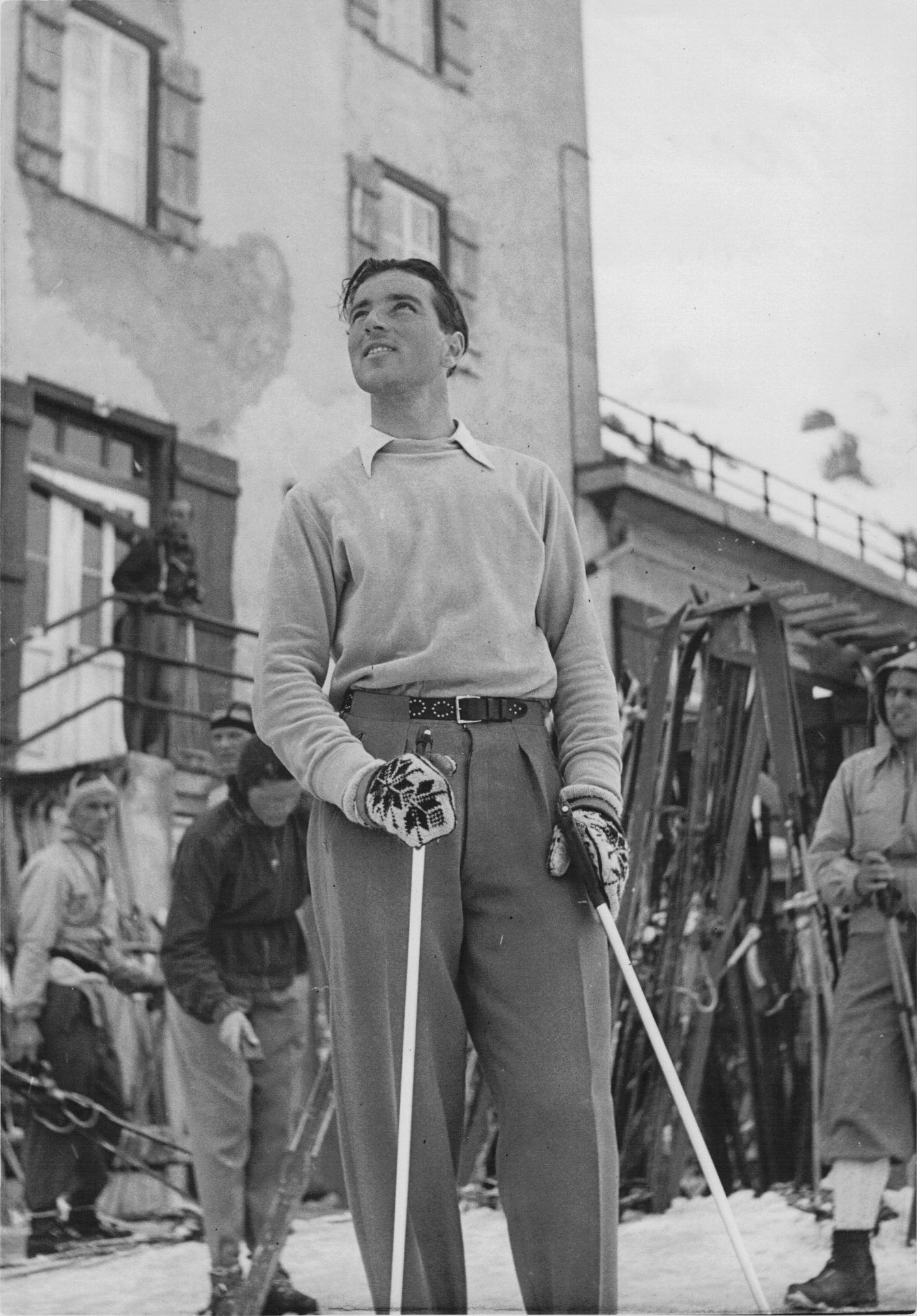 Der Sieger des Tages, Riesenslalom Rennen